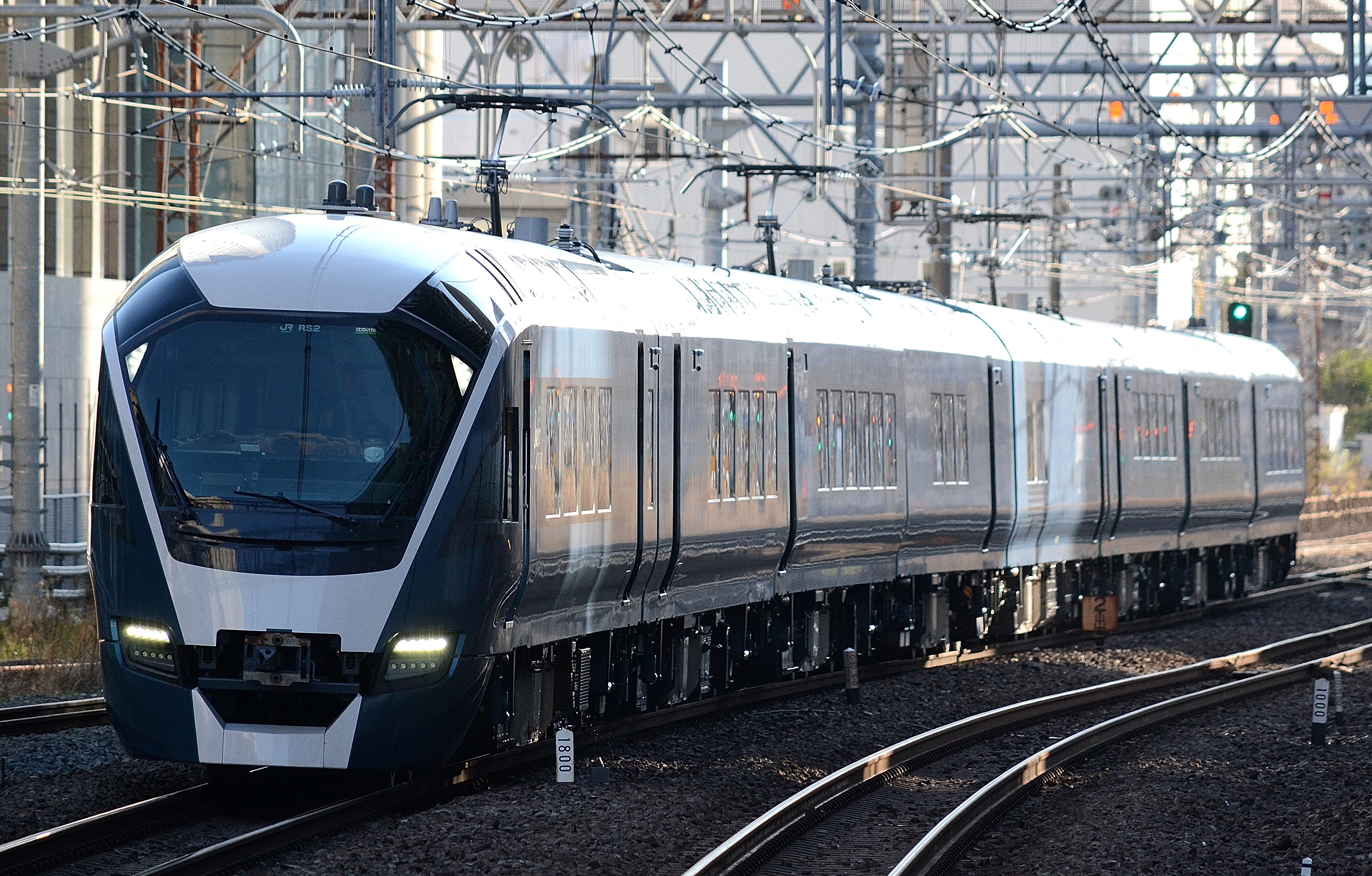 川崎駅付近を走行する特急サフィール踊り子に使用されるE261系RS2編成（川崎駅ホームから撮影）